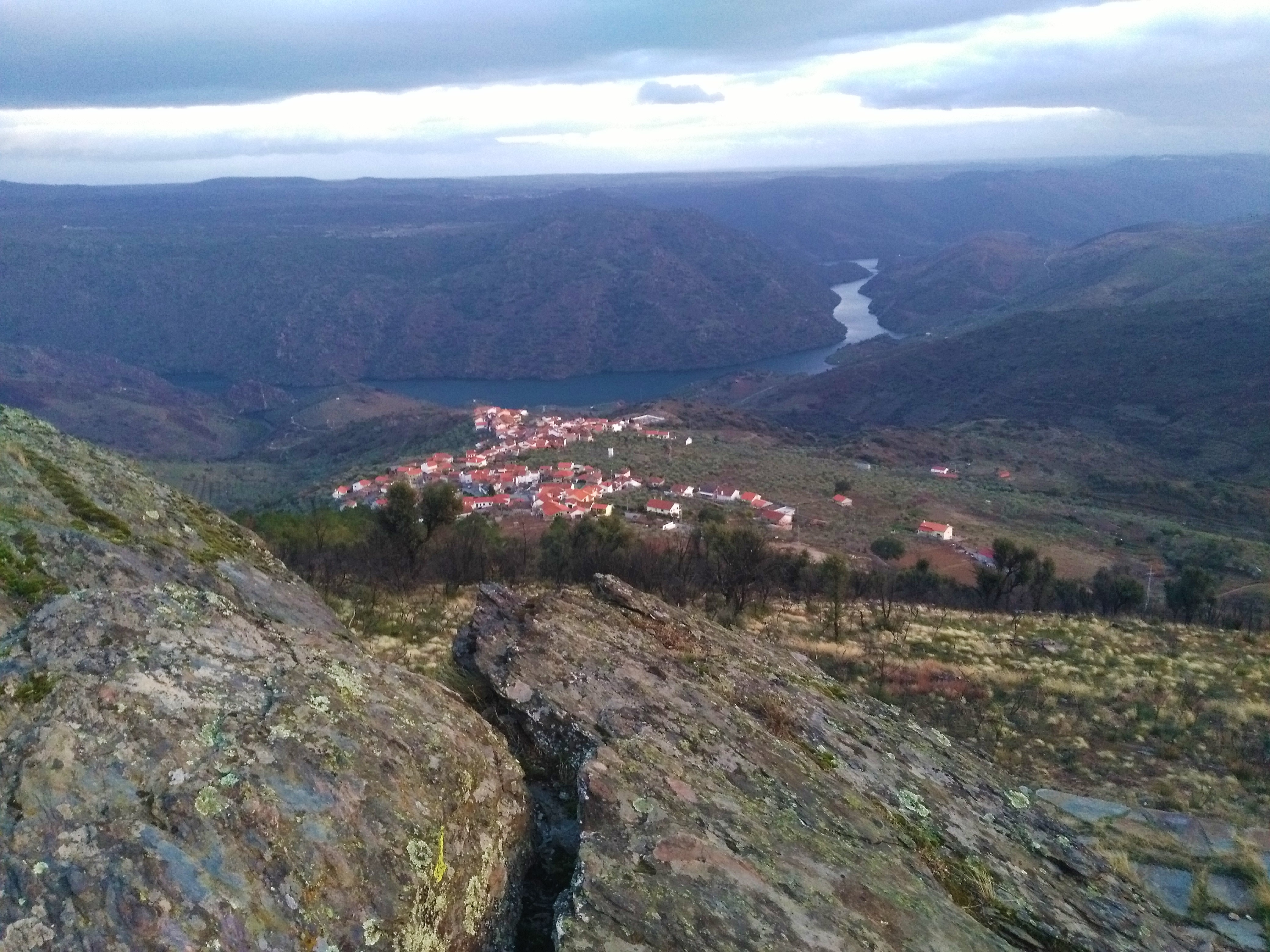 La paroisse de Mazouco au Portugal en janvier 2018.